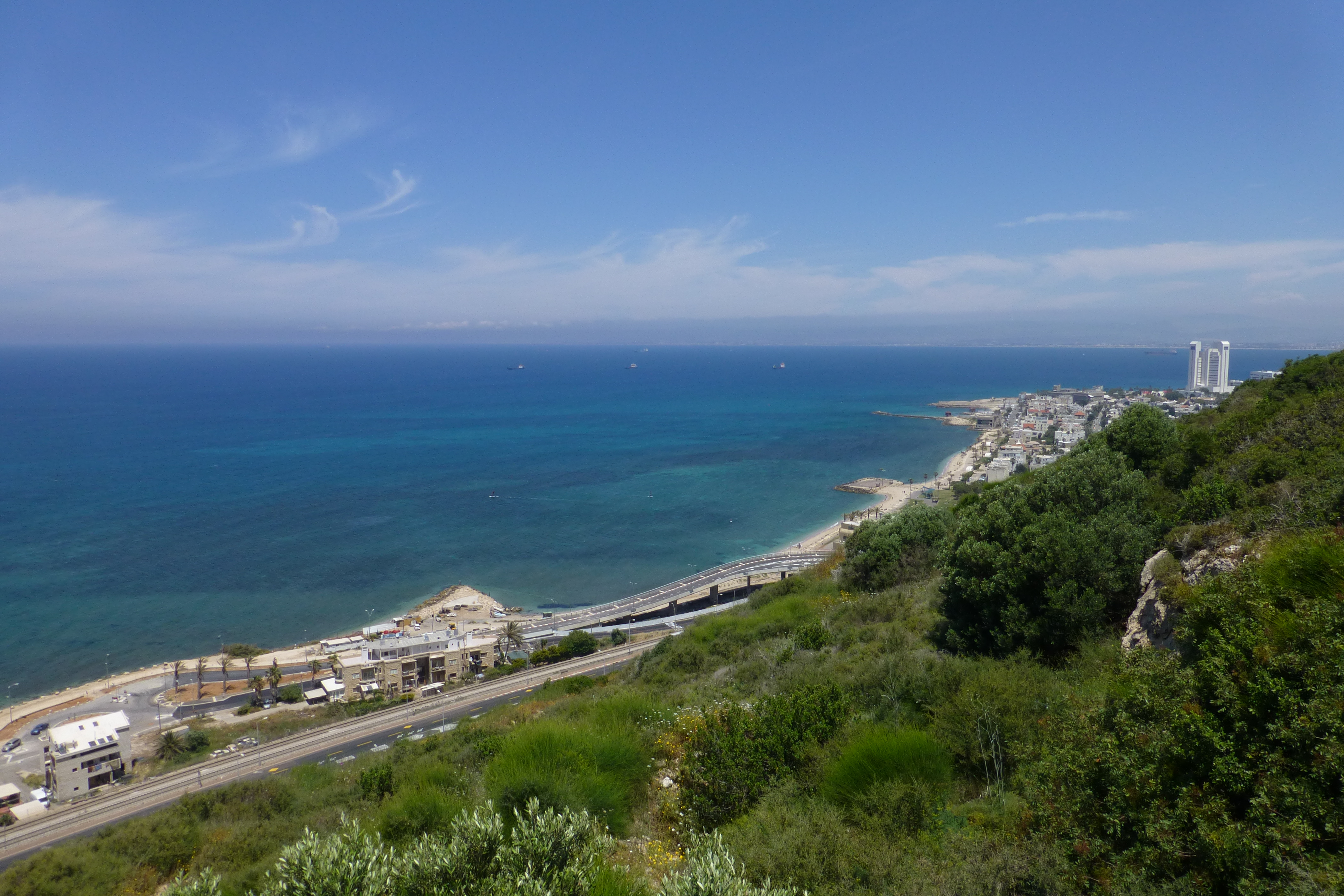 קזינו בת גלים היה מבנה בשכונת בת גלים בחיפה ששימש לפעילויות קהילה ופנאי משנות ה-30 של המאה ה-20, אך נהרס לאחר שנים, וכיום ניצב במקומו שלד בטון. חרף שמו, לא שימש המקום מעולם כקזינו.